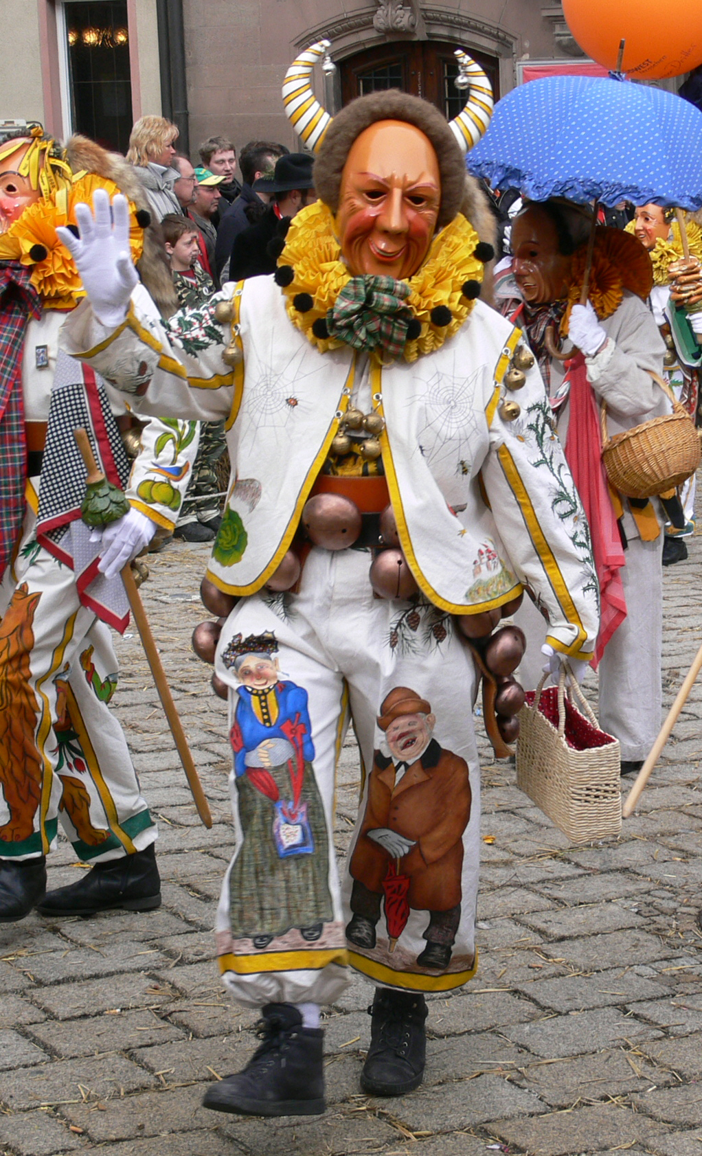 Narrenzunft Schramberg, Figur: Narro Veranstaltung: Narrensprung beim Narrentreffen Meßkirch 2006